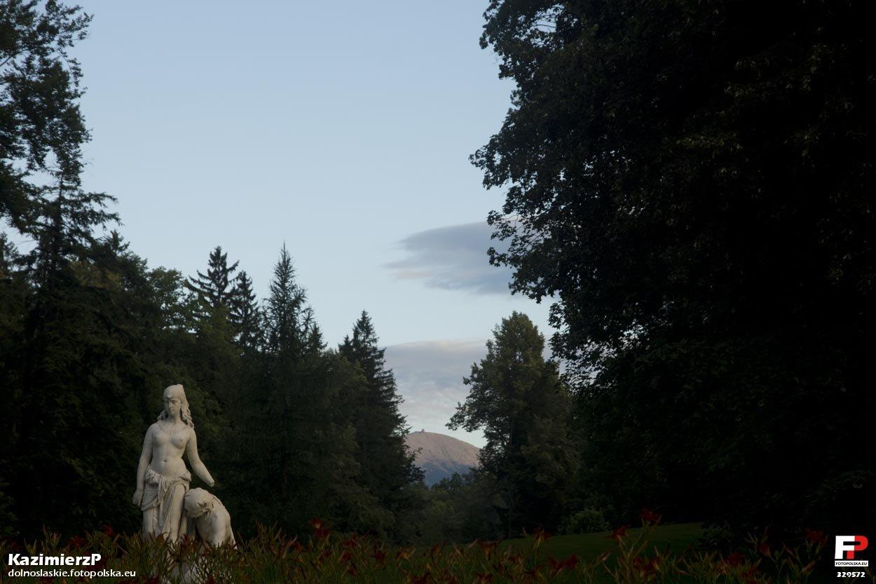 Po usunięciu bezmyślnych nasadzeń w parku otworzyły się osie widokowe i siedząc na tarasie pałacu można równocześnie podziwiać posąg Kleopatry i szczyt Śnieżki.